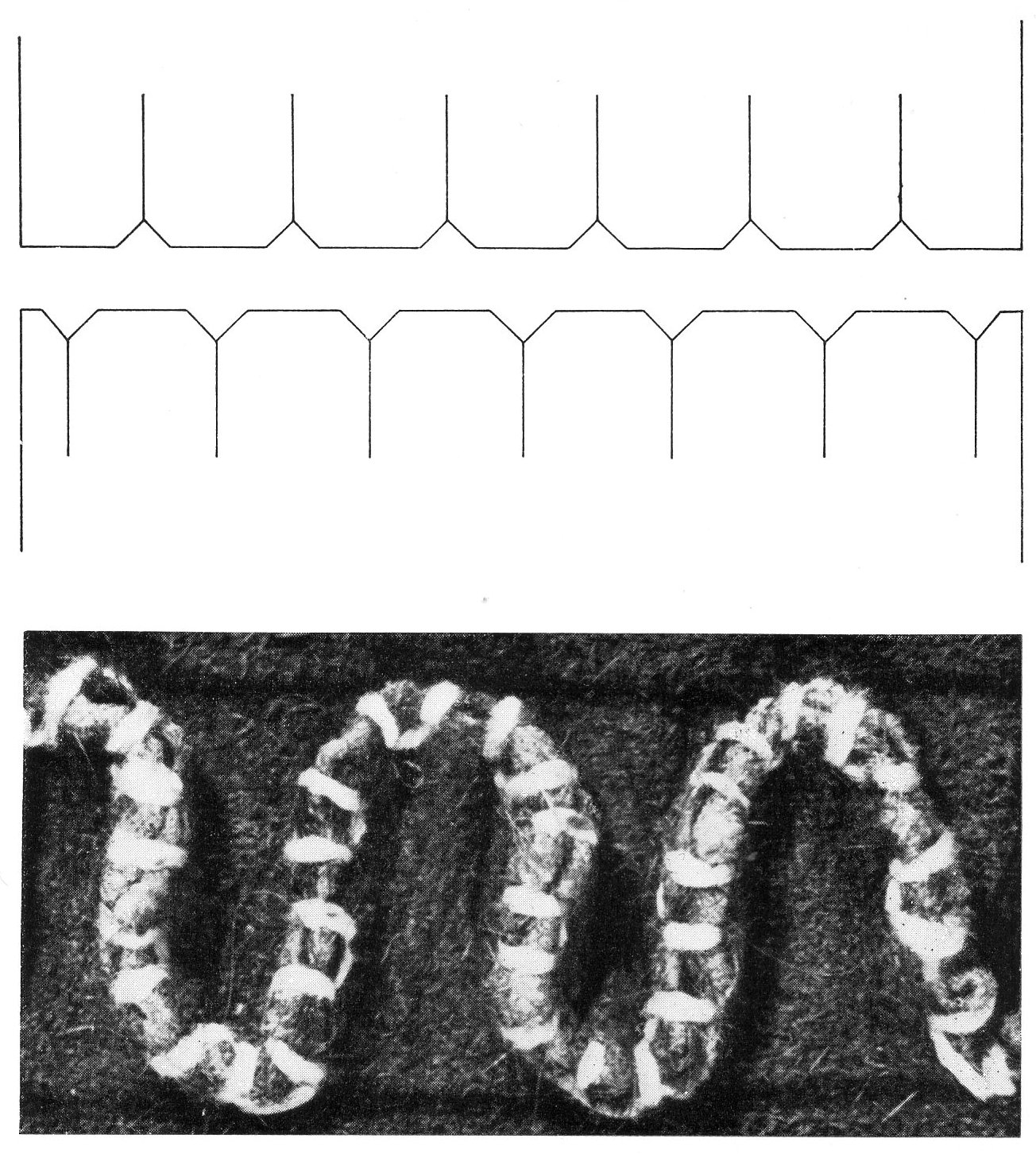 Nähte in der Kürschnerei: Absatz „Nähtechnik, Ledernähte, Polnische Zackennaht“, Bildunterschrift „Polnische Zackennaht ausgeführt mit Strohhutzwirn“.